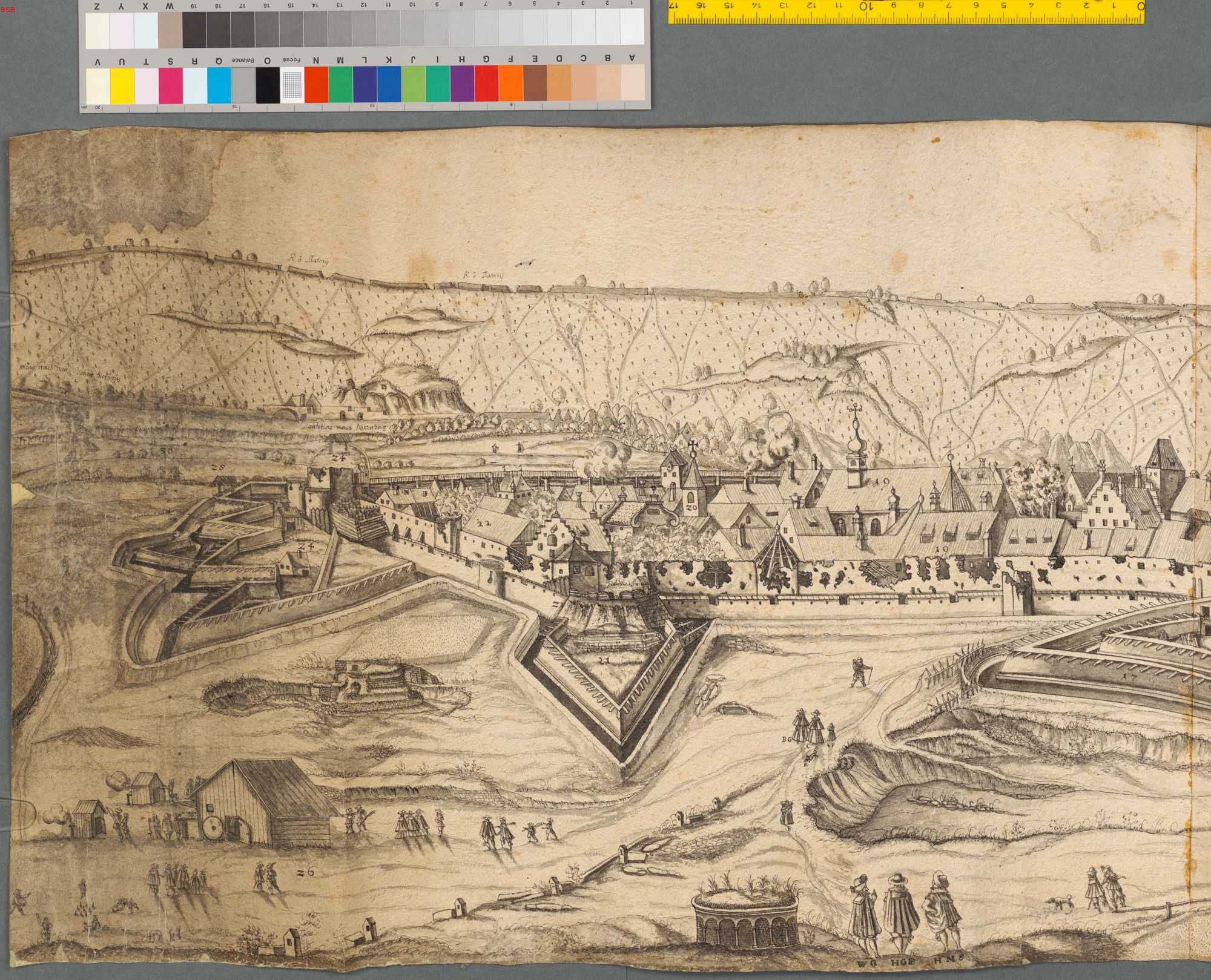 Ansicht der zerschossenen Stadt Regensburg. Prebrunn- Creuz-Batterie, Köpfstatt und Schiessplatz